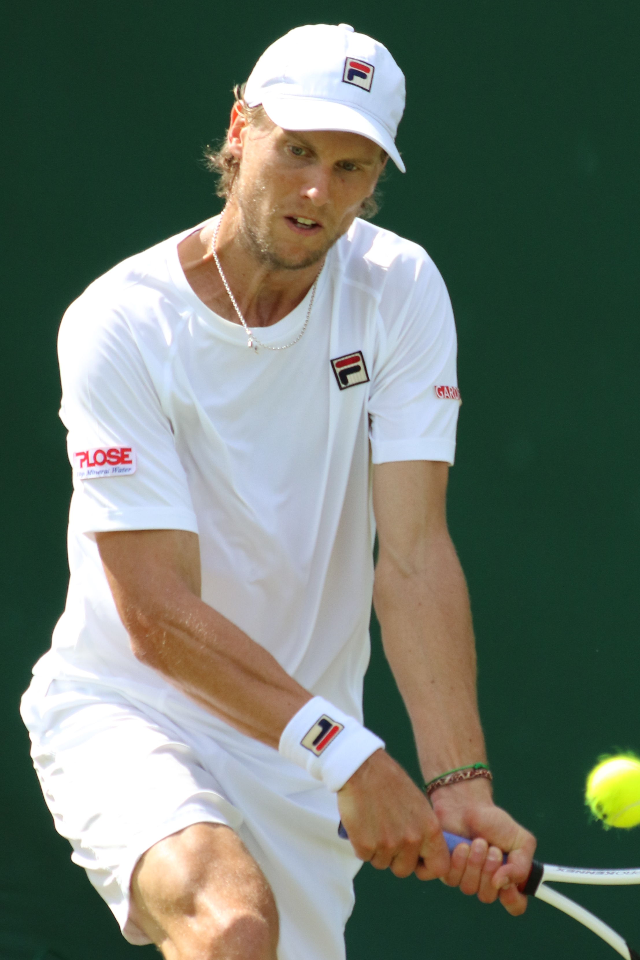 Seppi WM17 (8)